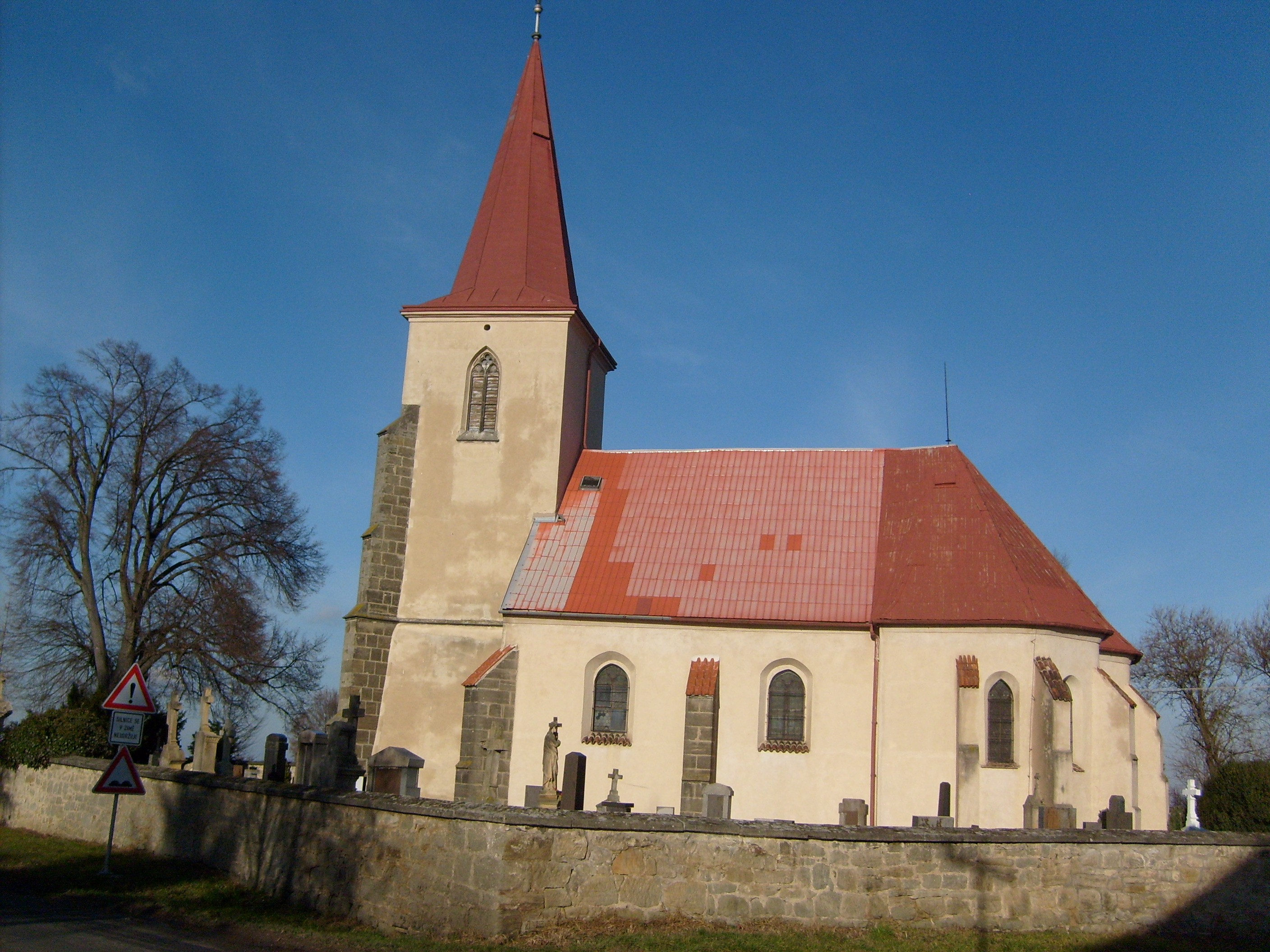 Kostel sv. Jiří, Tři Bubny, Orel, Pardubice Region, Czech Republic